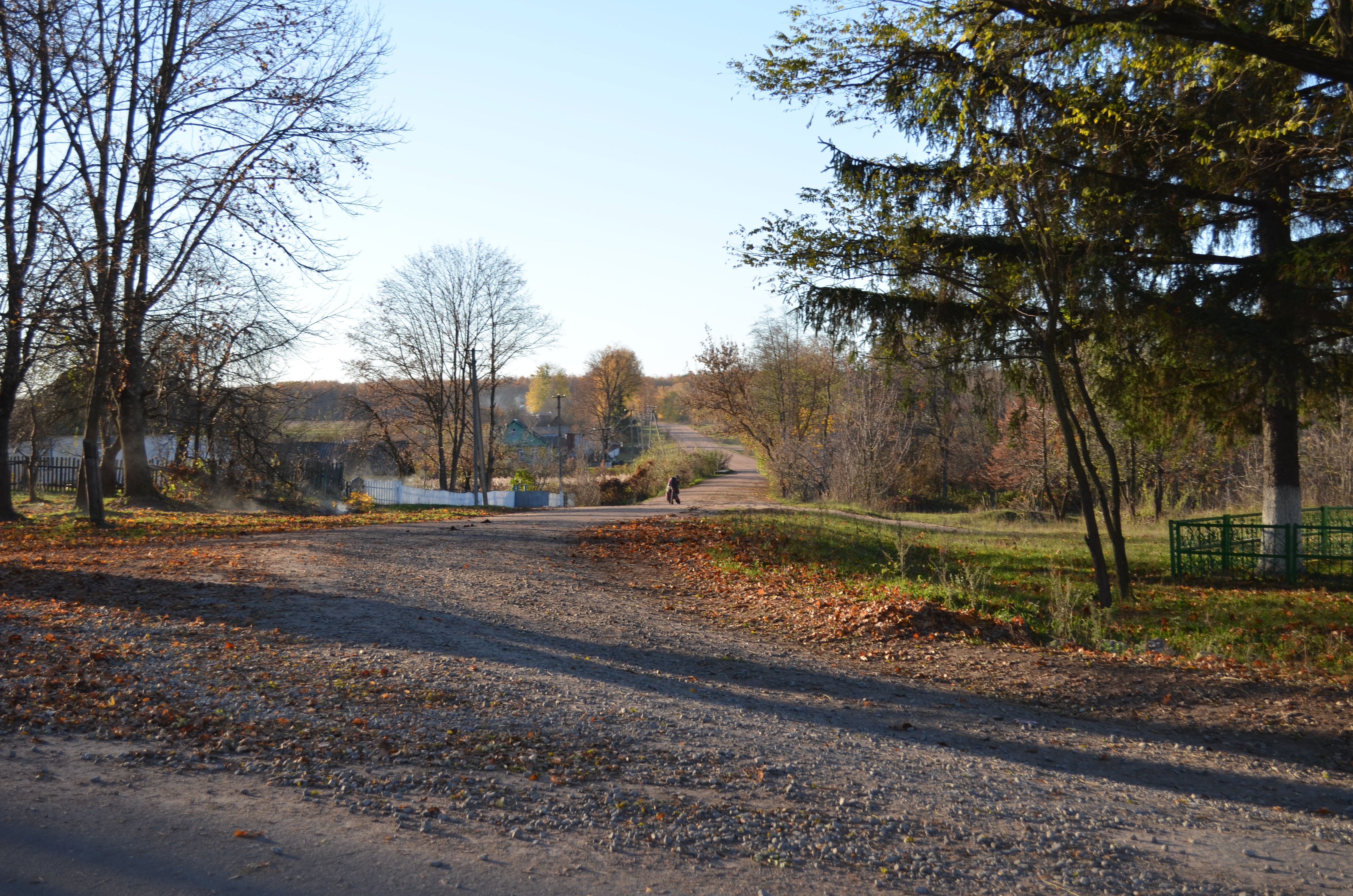 с. Сантарка.